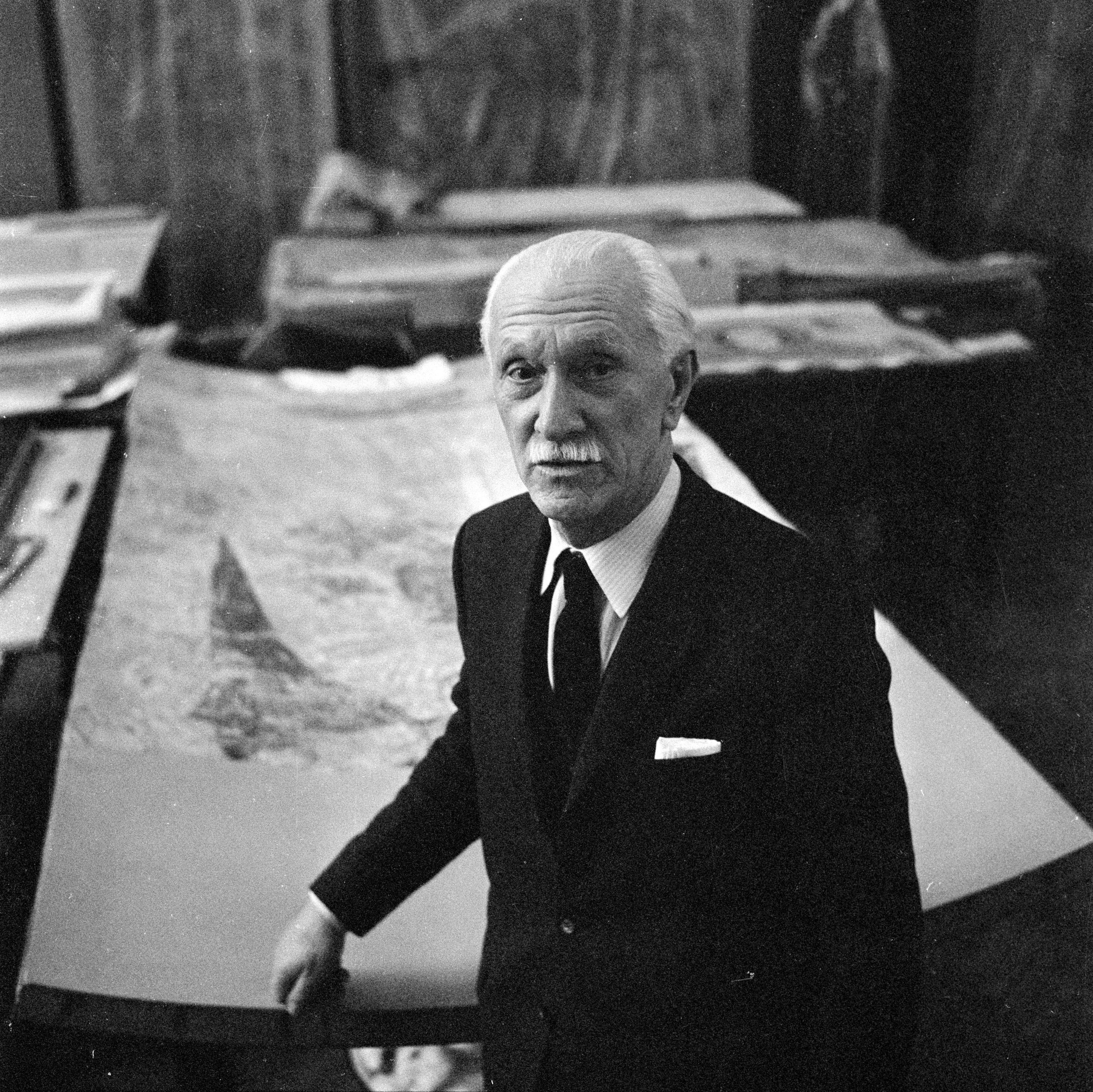 Profesor Kazimierz Michałowski przy kolebce gipsowej z rekonstruowanym malowidłem z Faras, Muzeum Narodowe w Warszawie